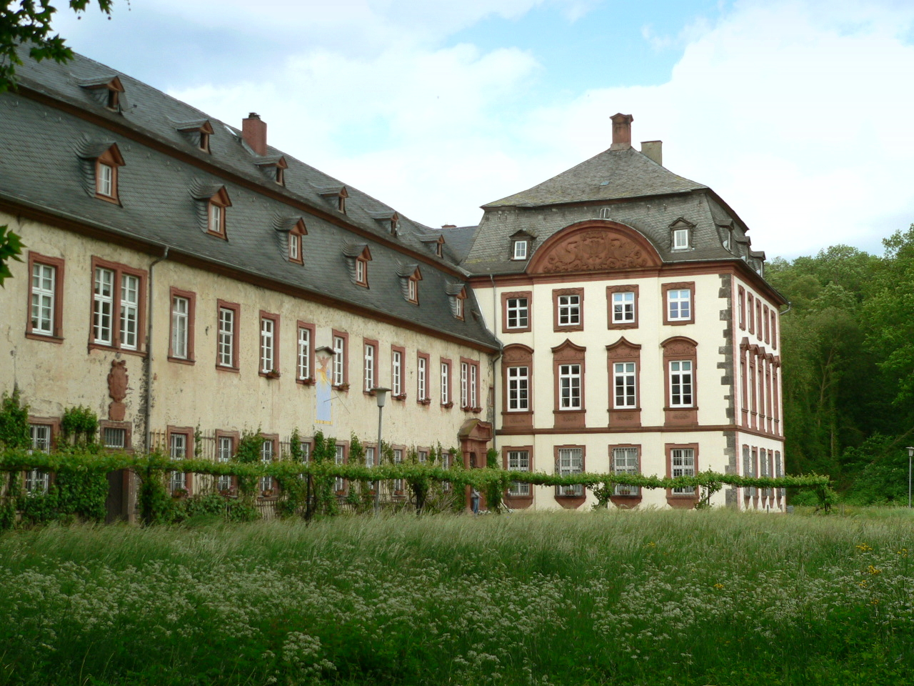 Die barocken Abteigebäude und Prälatenbau des Klosters Arnsburg bei Lich, Hessen, Germany